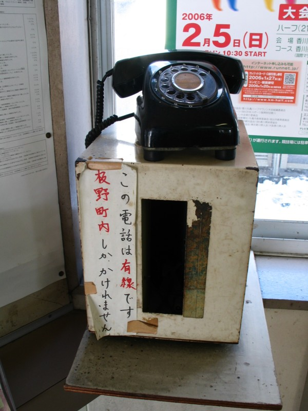 投稿者が撮影者の許可を得て掲載